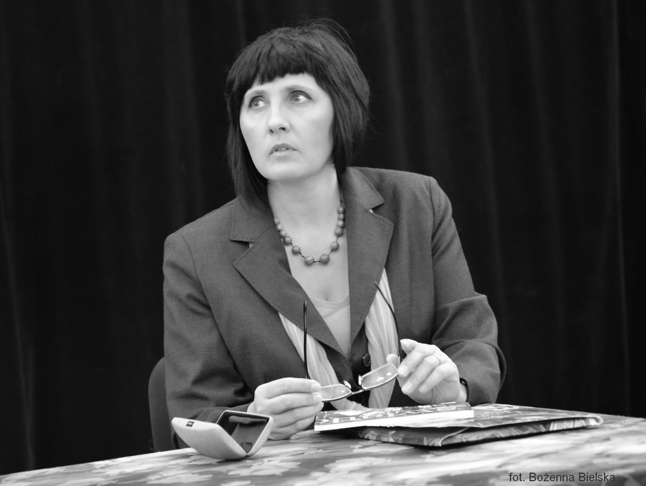 Beata Golacik (pseud. Kalina Kowalska) poetka. Spotkanie autorskie. Lublin 2014